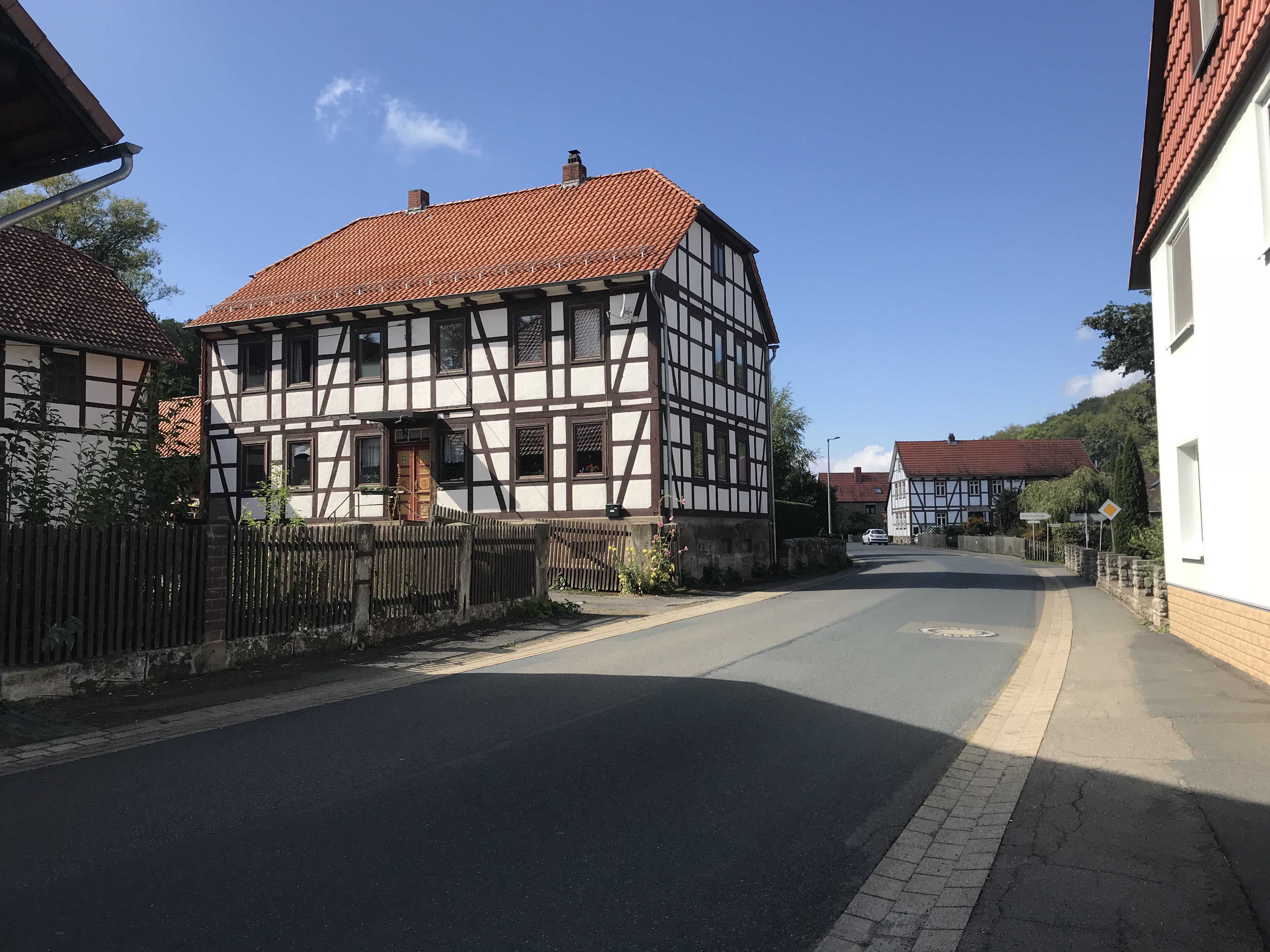 Wöllmarshuasen, Gottfried-August-Bürger-Straße nahe Ecke Spickenweg. Fotografiert im September 2018